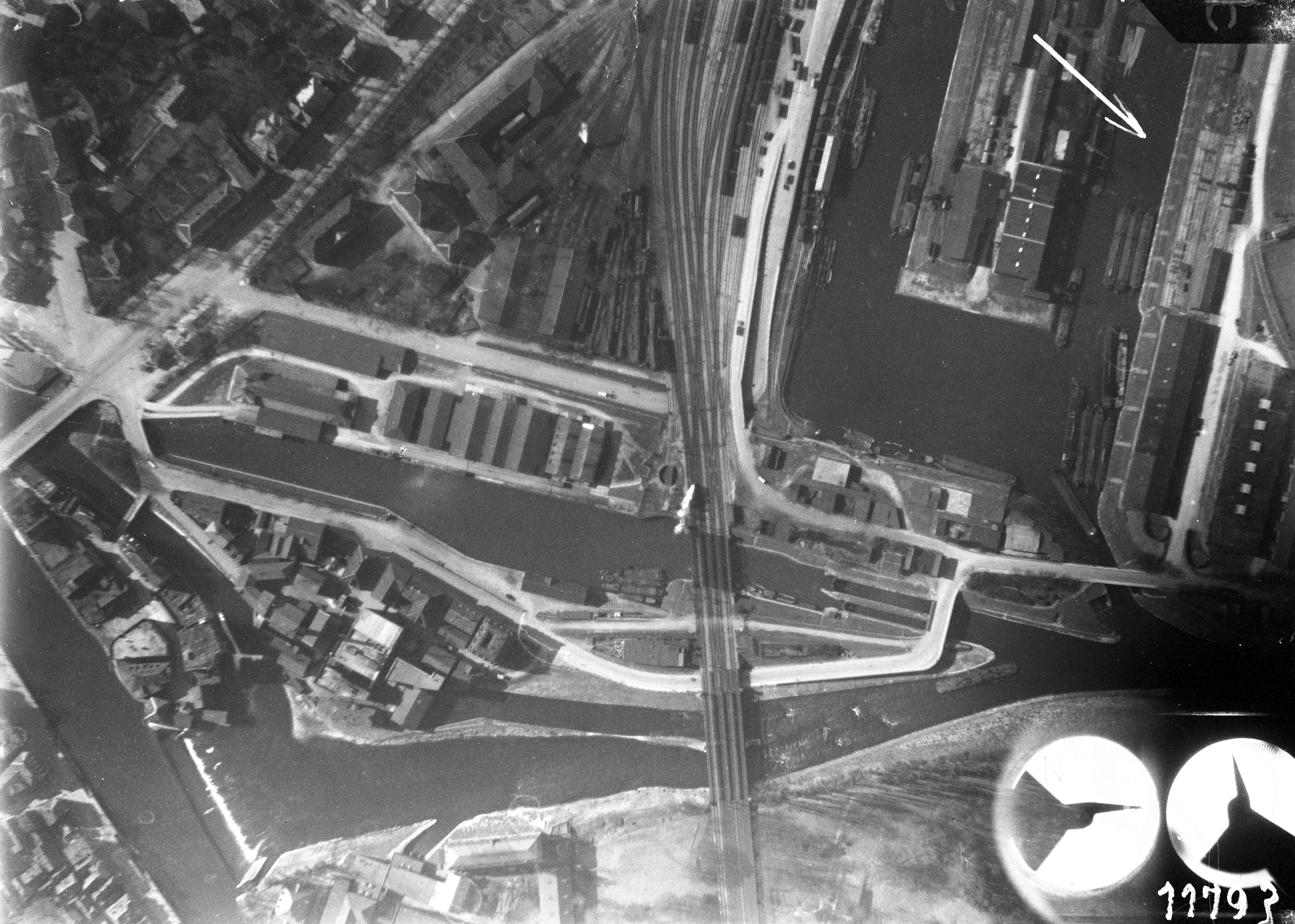 Luftbild von Teilen des Heilbronner Hafens im Jahr 1918, vermutlich zu militärischen Zwecken aufgenommen. Links mittig die Neckarinsel Hefenweiler, rechts davon die Kraneninsel, darüber der Wilhelmskanal. Oben mittig das Heilbronner Bahnbetriebswerk, rechts oben der Winterhafen.